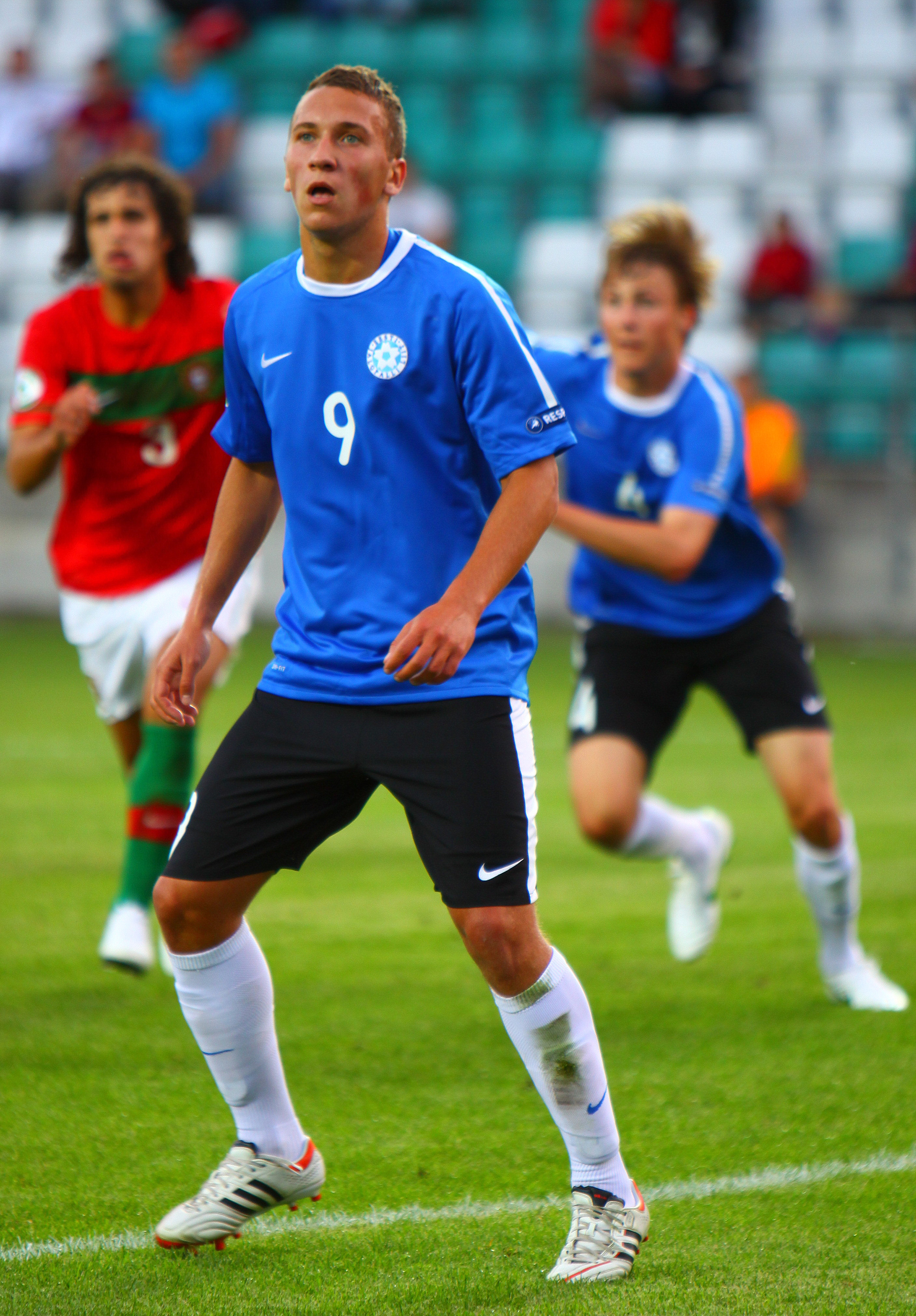 U-19 Estonia vs Portugal.